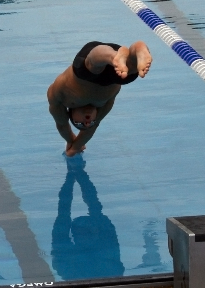 Hunor Mate